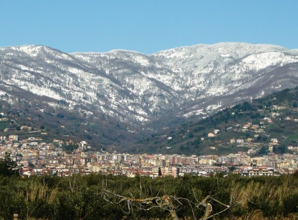 Il Monte Reventino innevato sullo sfondo della città di Lamezia Terme.